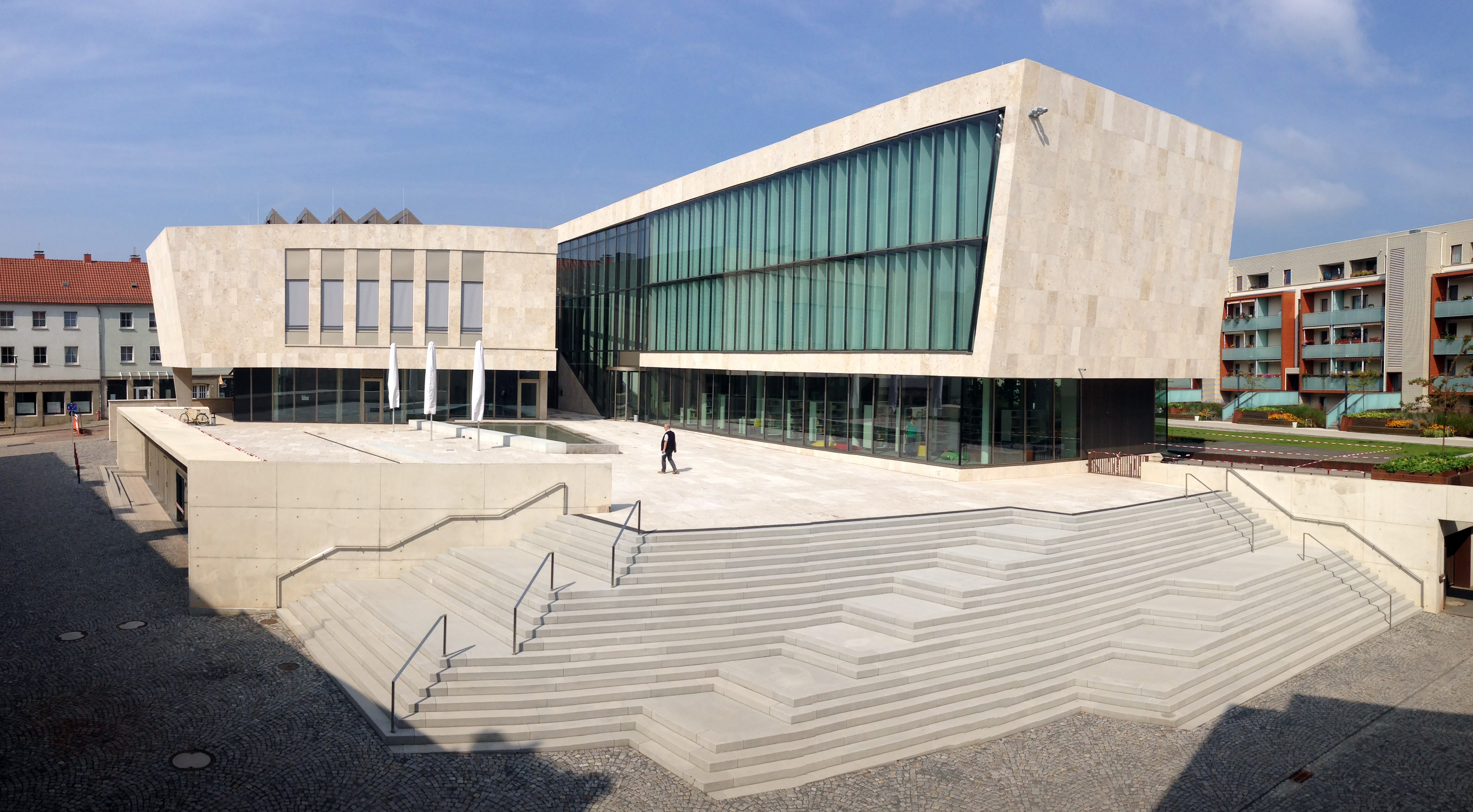 Die Stadtbibliothek "Rudolf Hagelstange am Nikolaiplatz 1 in Nordhausen